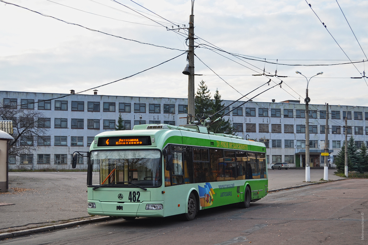 Эталон-БКМ-321 №482